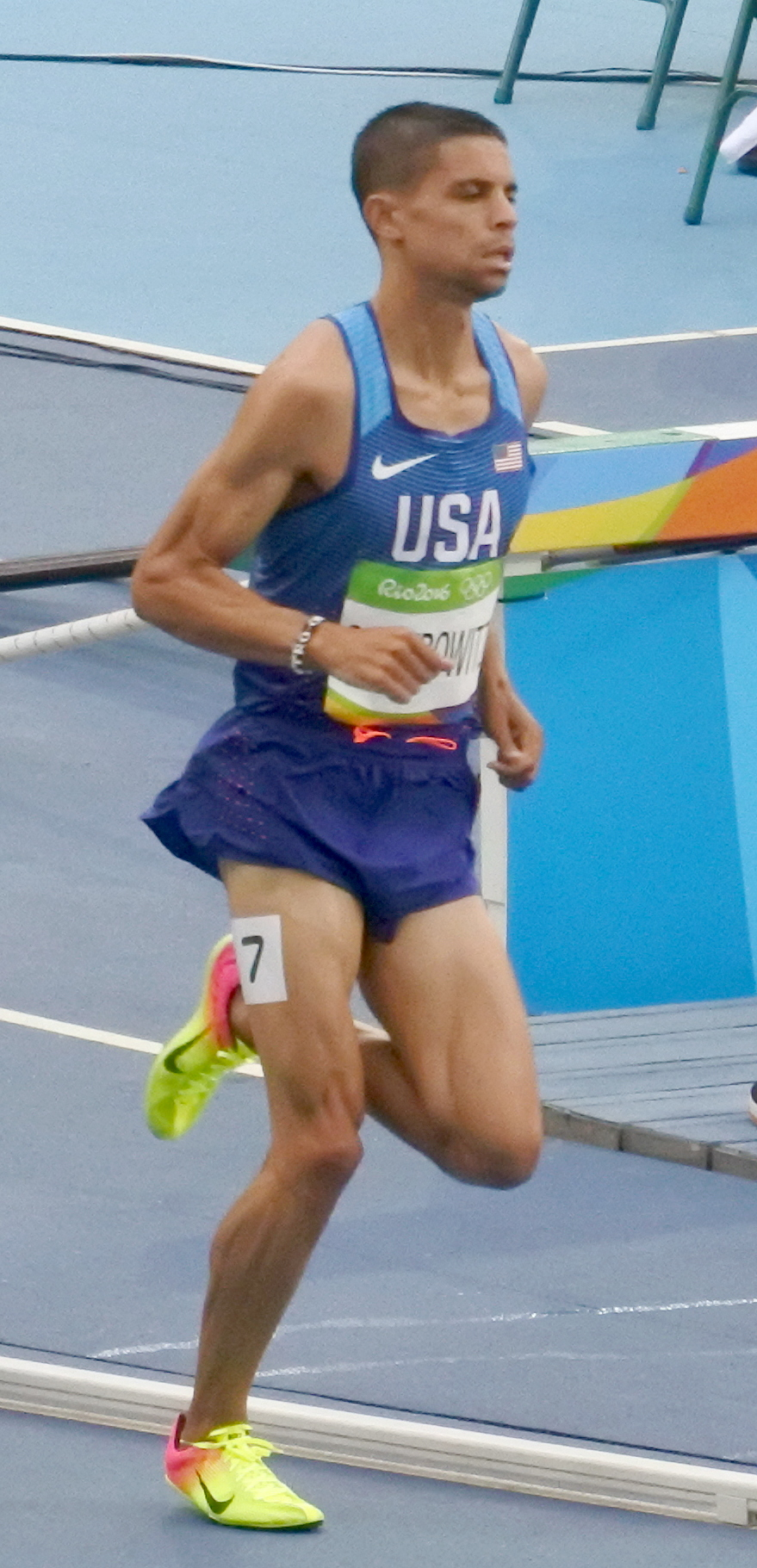 Rio 2016 - Eliminatórias 1500m Masculino